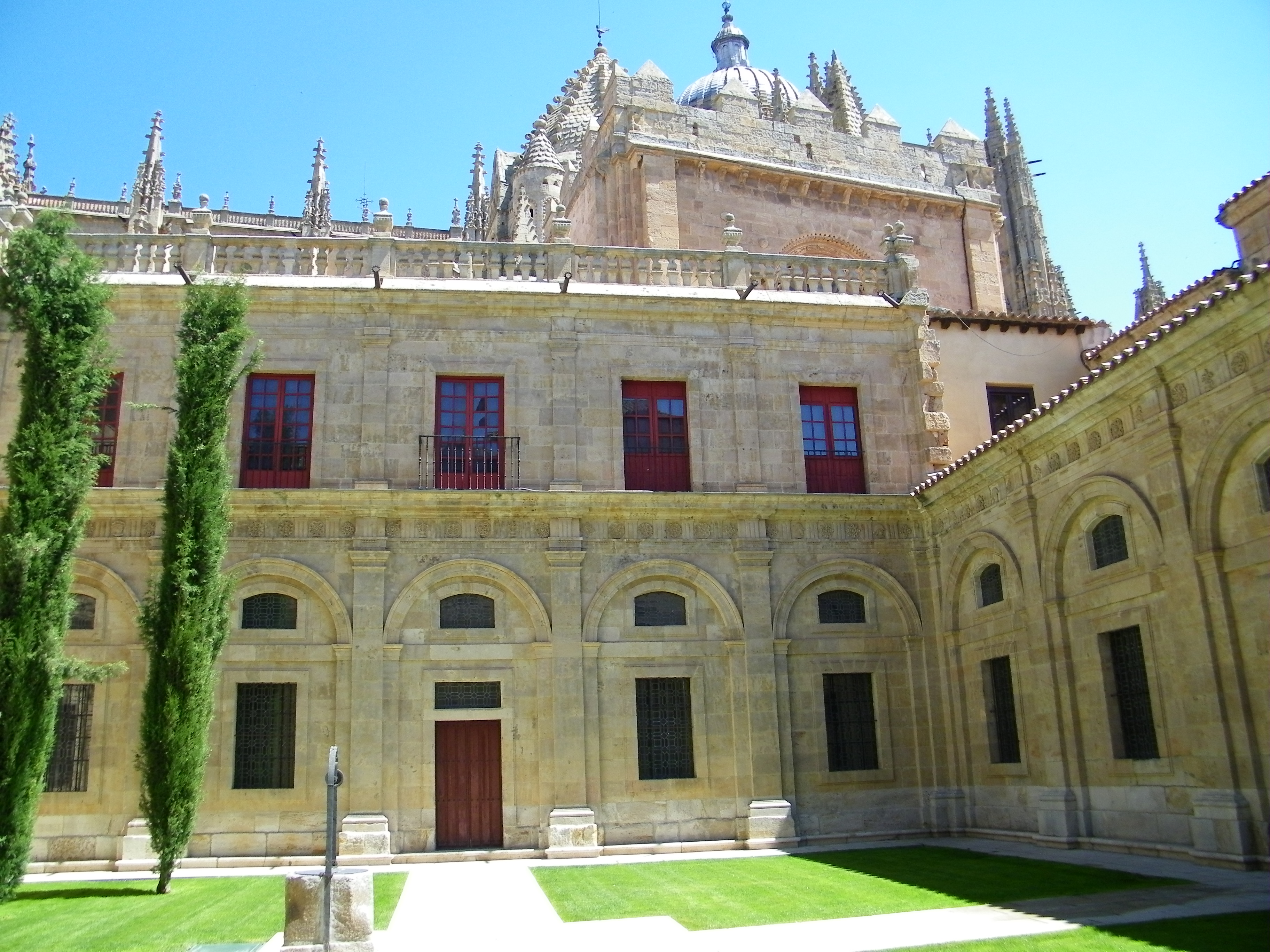 Salamanca. Claustro de la Catedral Vieja.